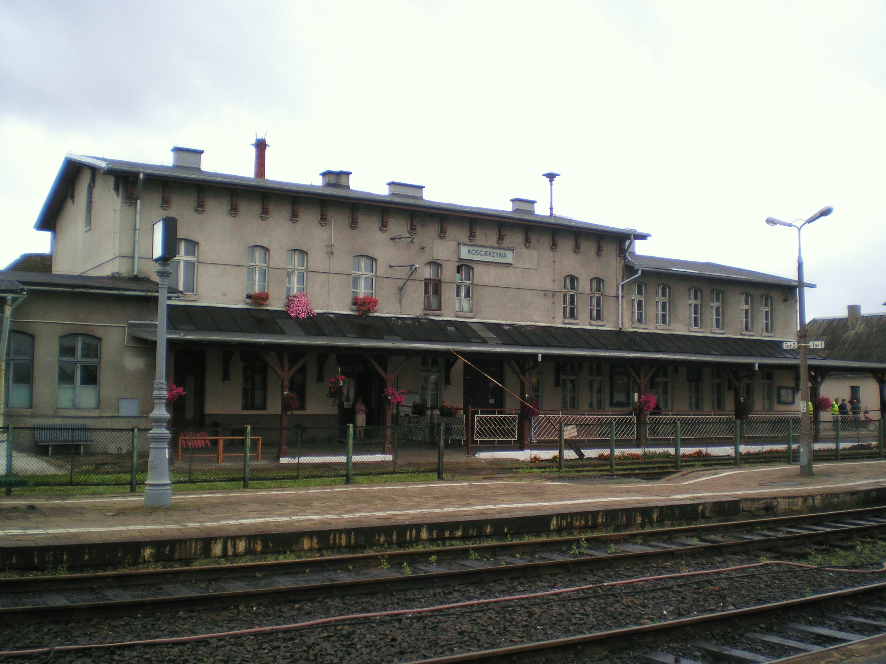 Kościerzyna, stacja kolejowa.